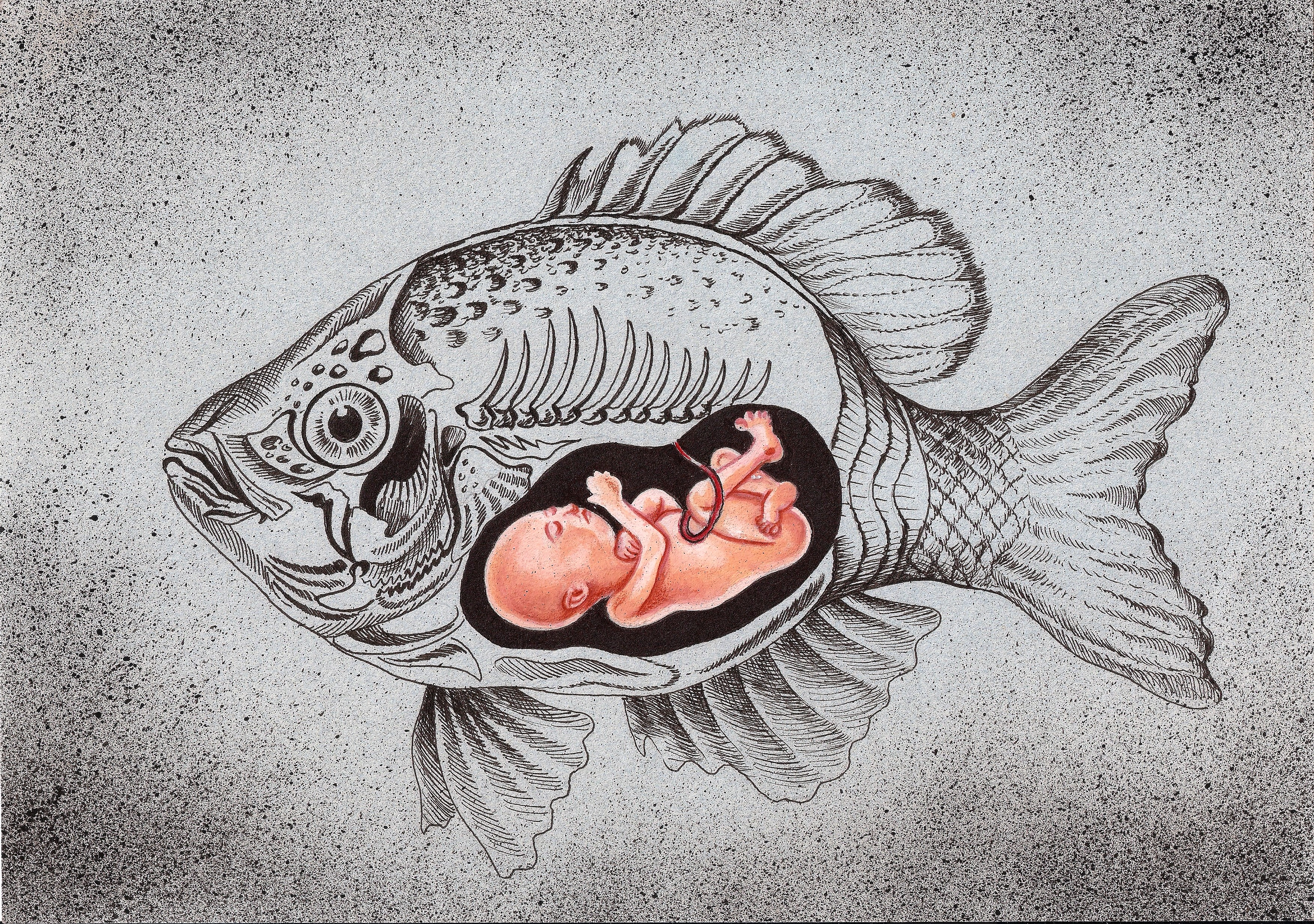 פרויקט דגים